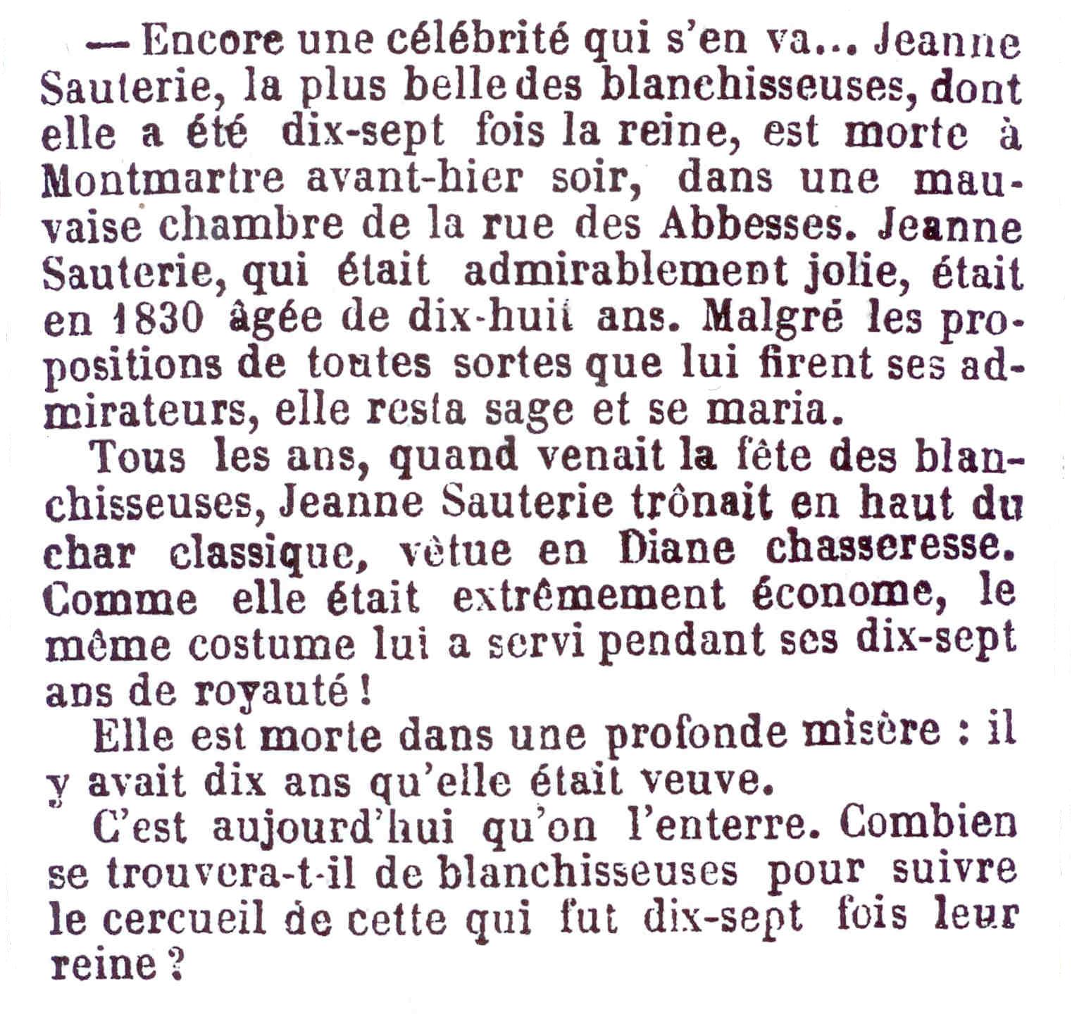 Annonce de la disparition de Jeanne Sauterie Reine des blanchisseuses de Paris de 1830 à 1847.